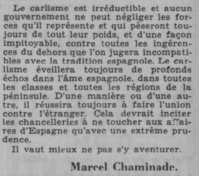 Extracto de urtículo de Marcel Chaminade sobre la guerra civil y el carlismo